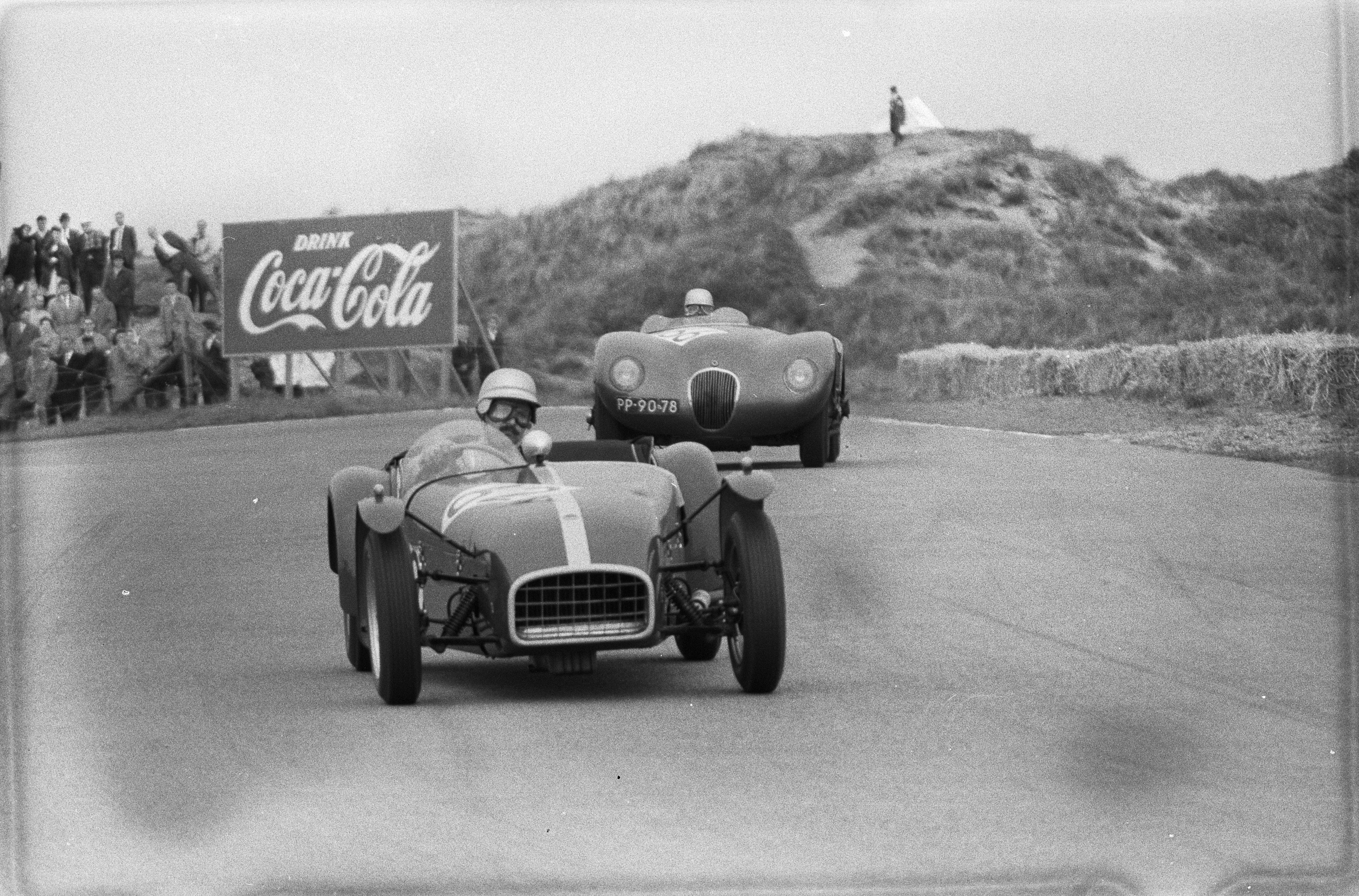 Collectie / Archief : Fotocollectie Anefo Reportage / Serie : [ onbekend ] Beschrijving : Nationale sportwagenraces op het circuit van Zandvoort, Hildebrand aan kop, daarachter Maasland Datum : 22 mei 1960 Locatie : Noord-Holland, Zandvoort Trefwoorden : circuits, sportwagenraces Persoonsnaam : Hildebrand Fotograaf : Pot, Harry / Anefo Auteursrechthebbende : Nationaal Archief Materiaalsoort : Negatief (zwart/wit) Nummer archiefinventaris : bekijk toegang 2.24.01.05 Bestanddeelnummer : 911-2734